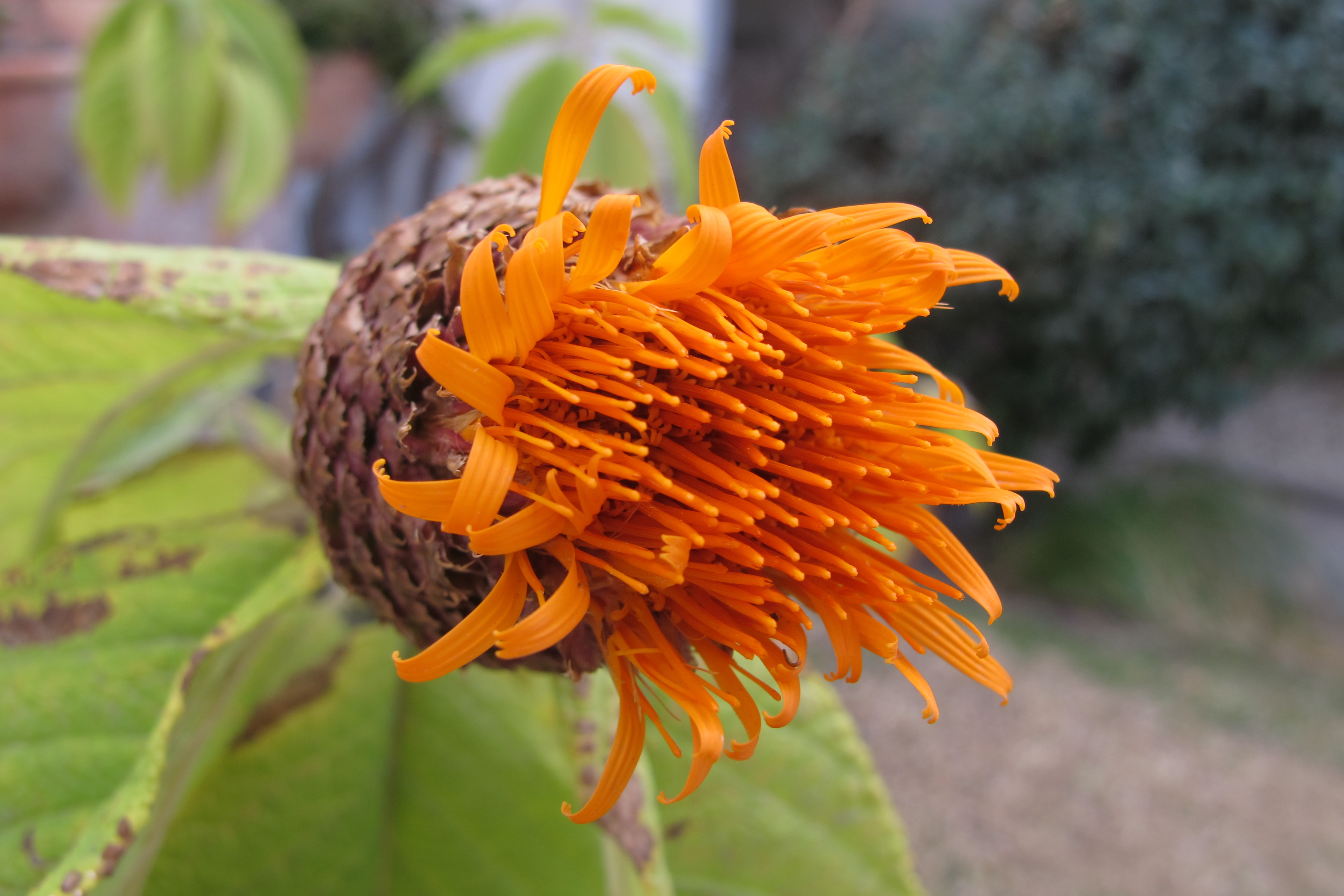 Cnicothamnus lorentzii, también conocida como "azafrán del campo"